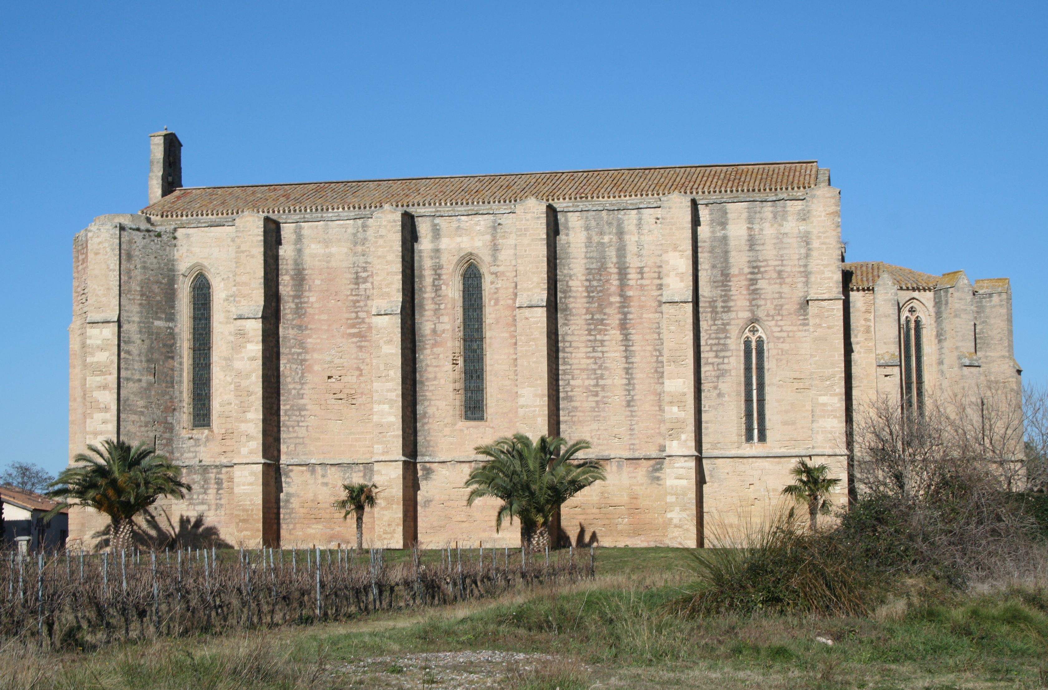 Loupian (Hérault) - église Sainte-Cécile, façade méridionale.